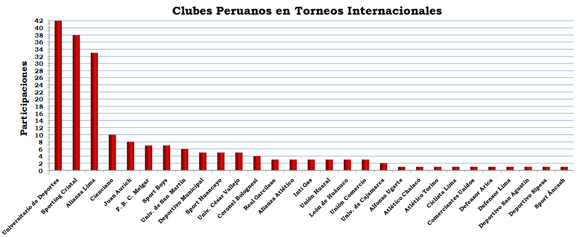 Participaciones de Clubes Peruanos en Torneos Internacionales.